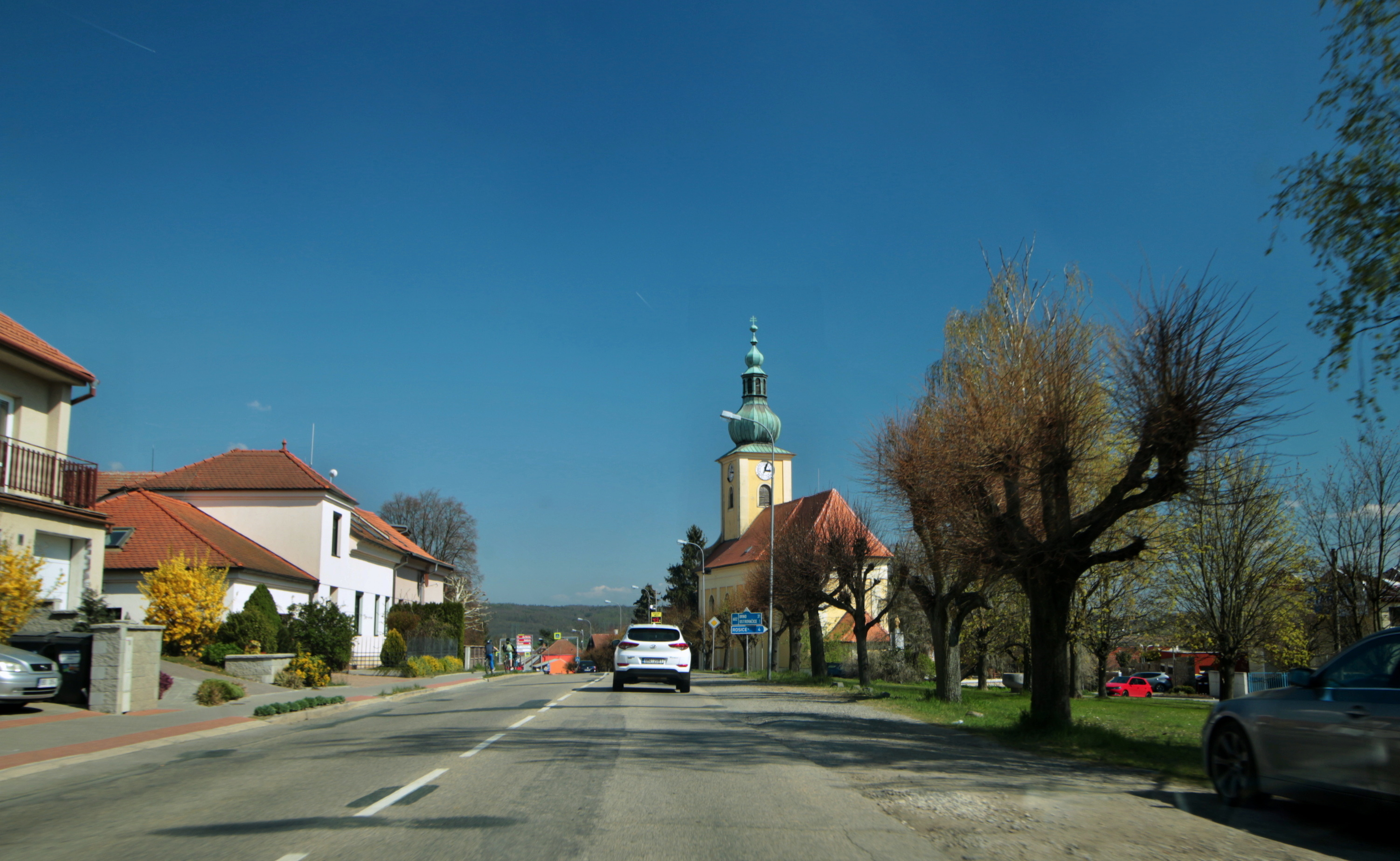 Kostel sv. Petra a Pavla v Říčanech (okres Brno-venkov)